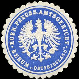 Siegelmarke Koeniglich Preussisches Amtsgericht Berum; bis 1918